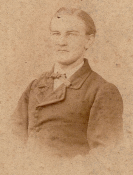 Foto von Friedrich Boden als Student in Göttingen im Jahre 1863